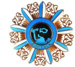 Знак ордена «Достык» 1-й степени